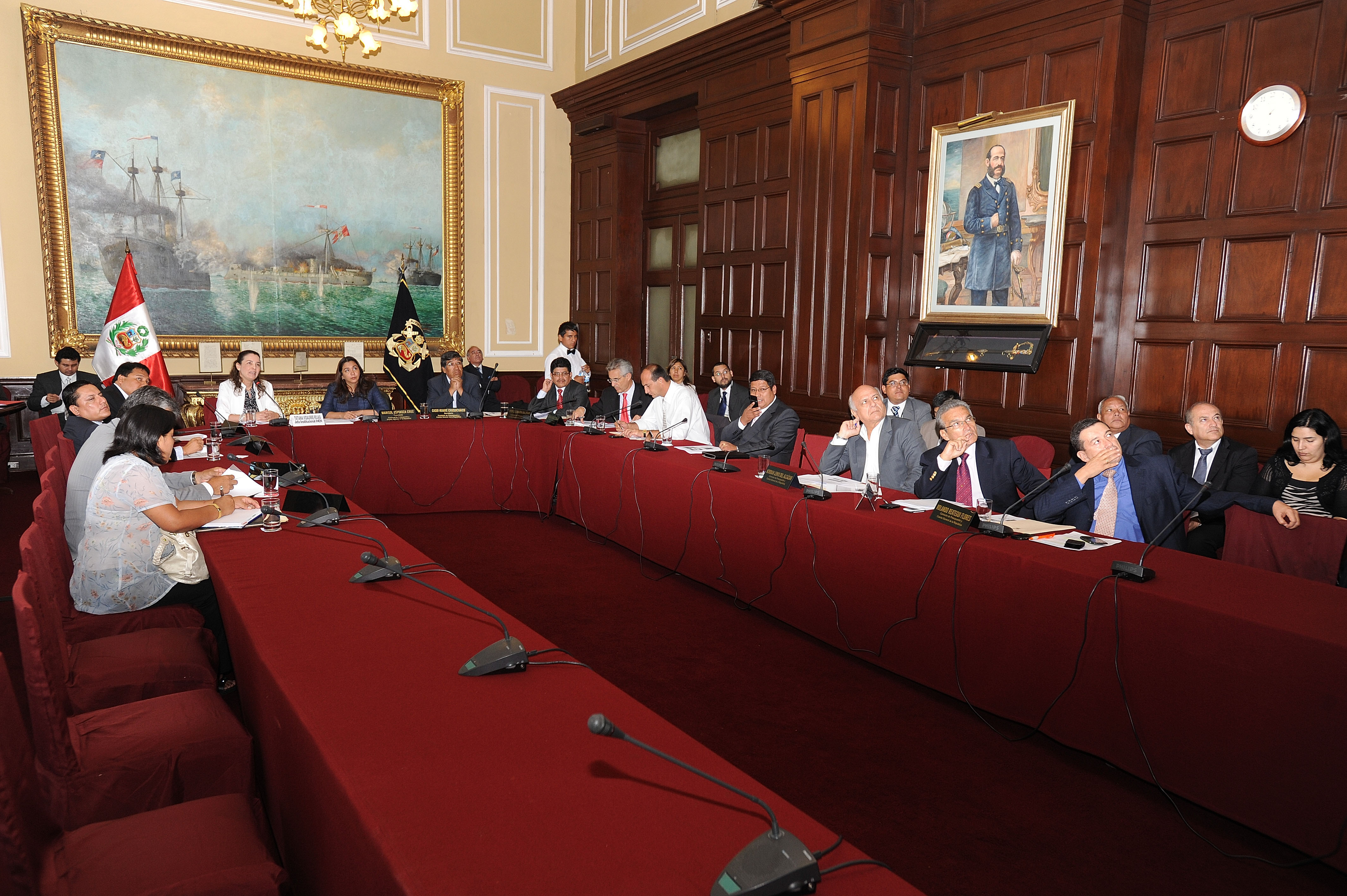 La titular del Instituto Nacional de Enfermedades Neoplásicas, Tatiana Vidaurre, expone en sesión de la Comisión de Presupuesto sobre la ejecución presupuestal de su institución en el año 2011 y los avances efectuados a la fecha del año fiscal 2012.